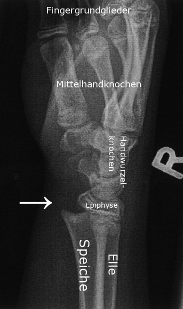 Handgelenk eines 13 jährigen Jungen, auf Papier ausgedrucktes und wieder eingescanntes Röntgenbild einer frischen distalen Radius-Epiphysiolyse mit dorsal dislozierter Epiphyse. Die Aufnahme nach der Osteosynthese (Operation) findet sich hier unter dem Namen Radius-epiphysiolyse02.jpg.